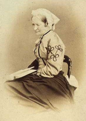 Hansine Pouline Andræ (5.4.1817-17.3.1898), kaldenavn: Sine